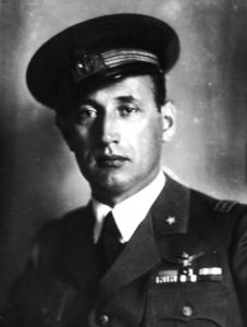 Piero Parini